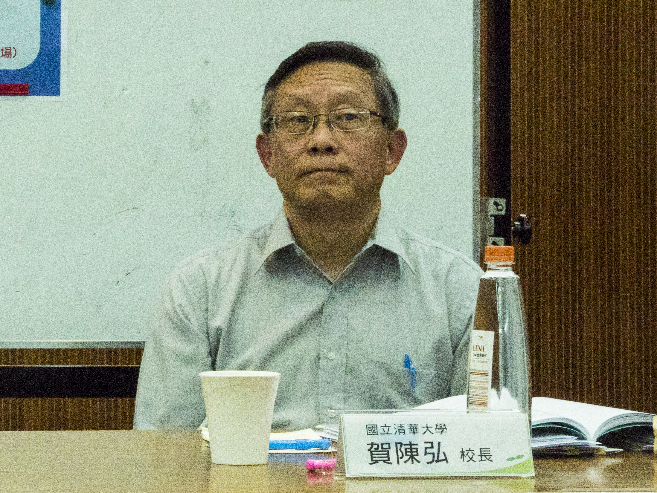 陳惠邦與賀陳弘